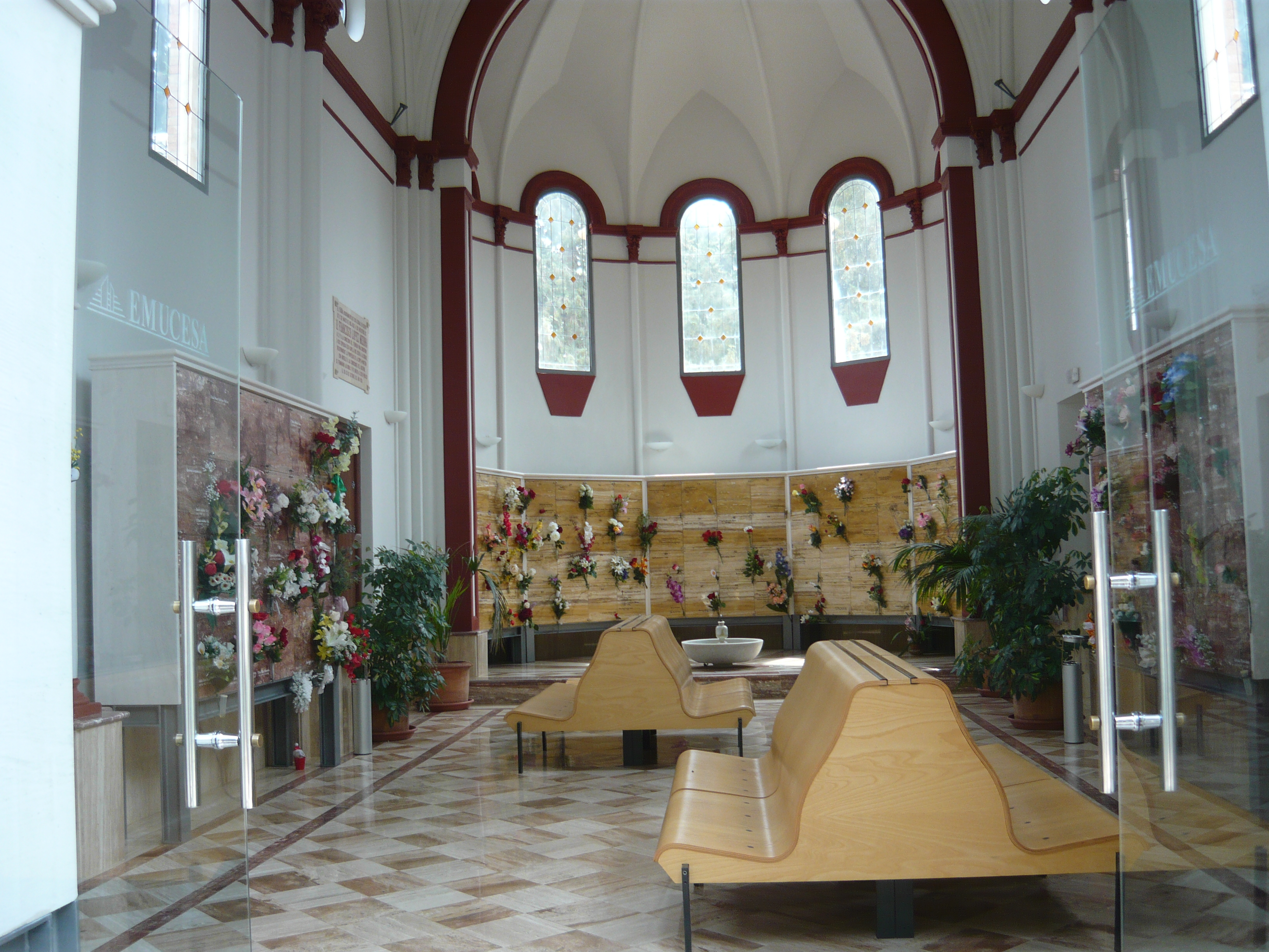 Ermita del Cementerio de Granada (España).